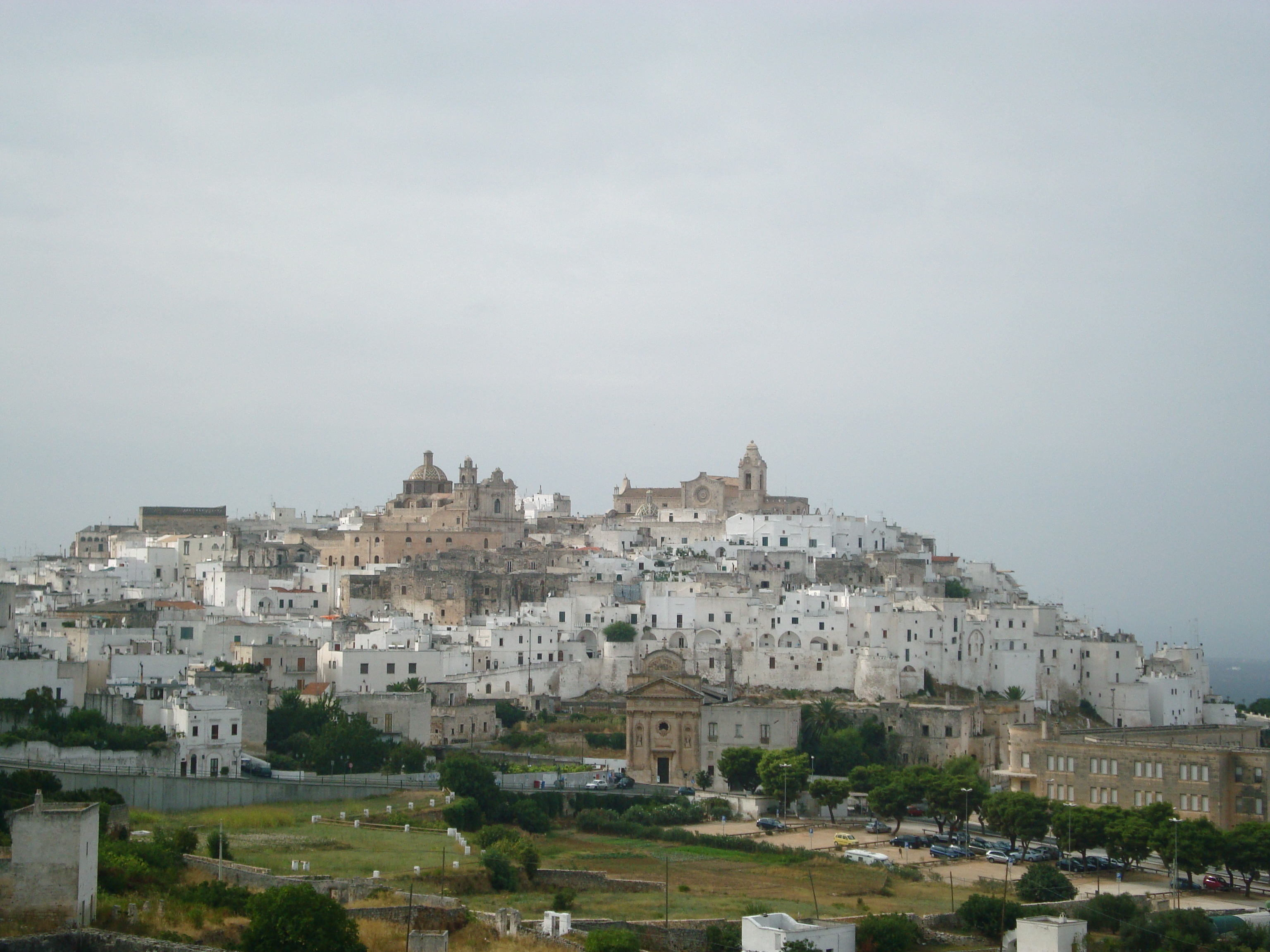 Vue générale d'Ostuni dans les Pouilles